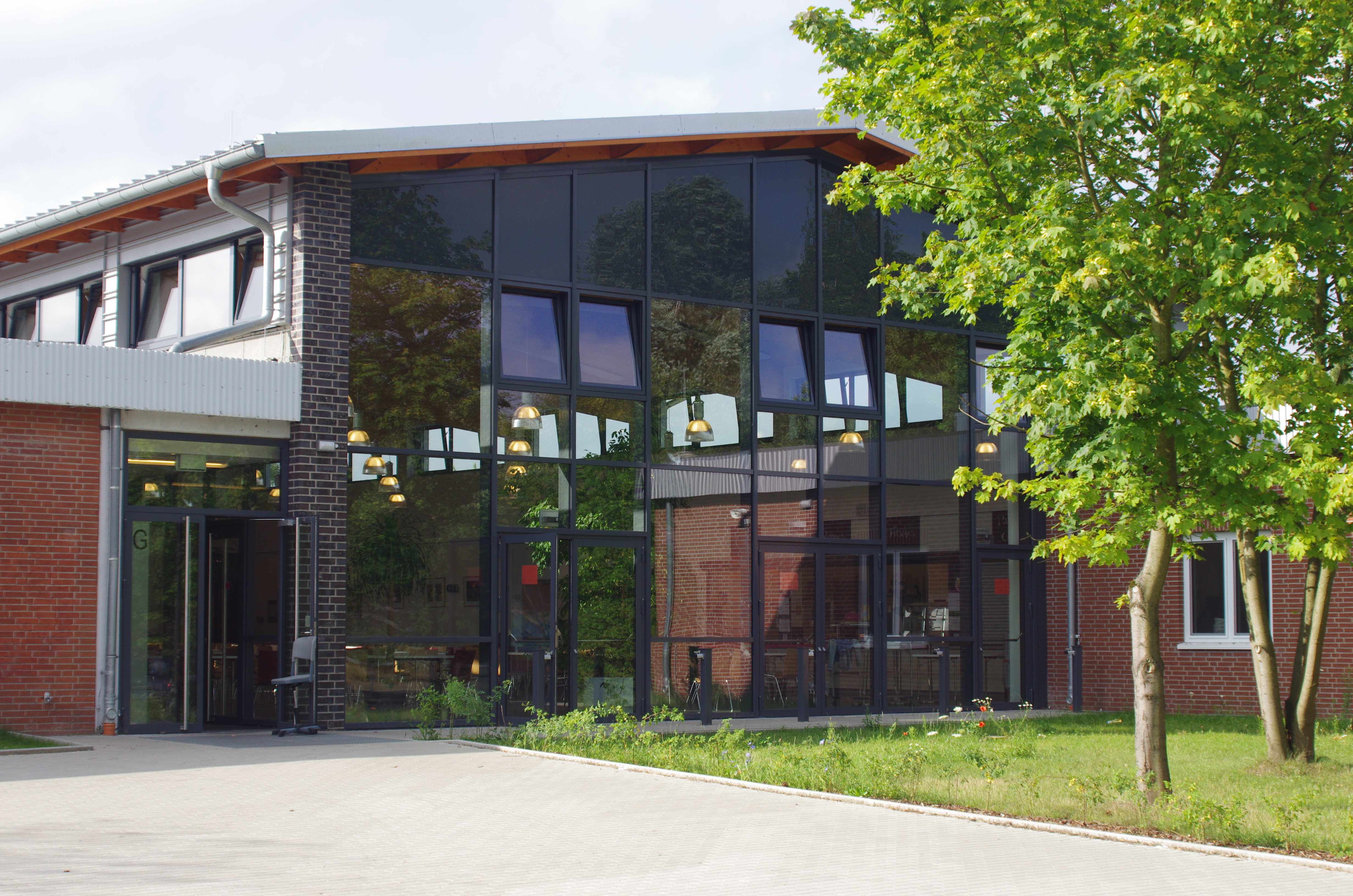 Mensa des Schulzentrum Oedeme in der Hanseschule Oedeme